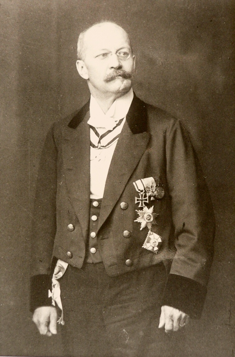 Fotografie von Hermann von Chappuis